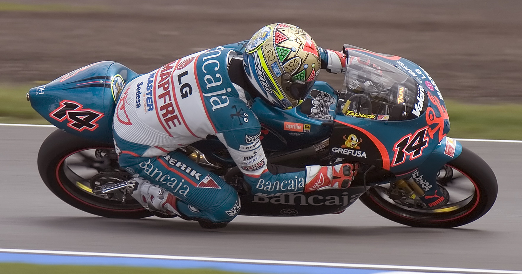 De Gábor Talmácsi, Ungarn, op enger Aprilia 125 cc beim British GP 2007, Donington Park.